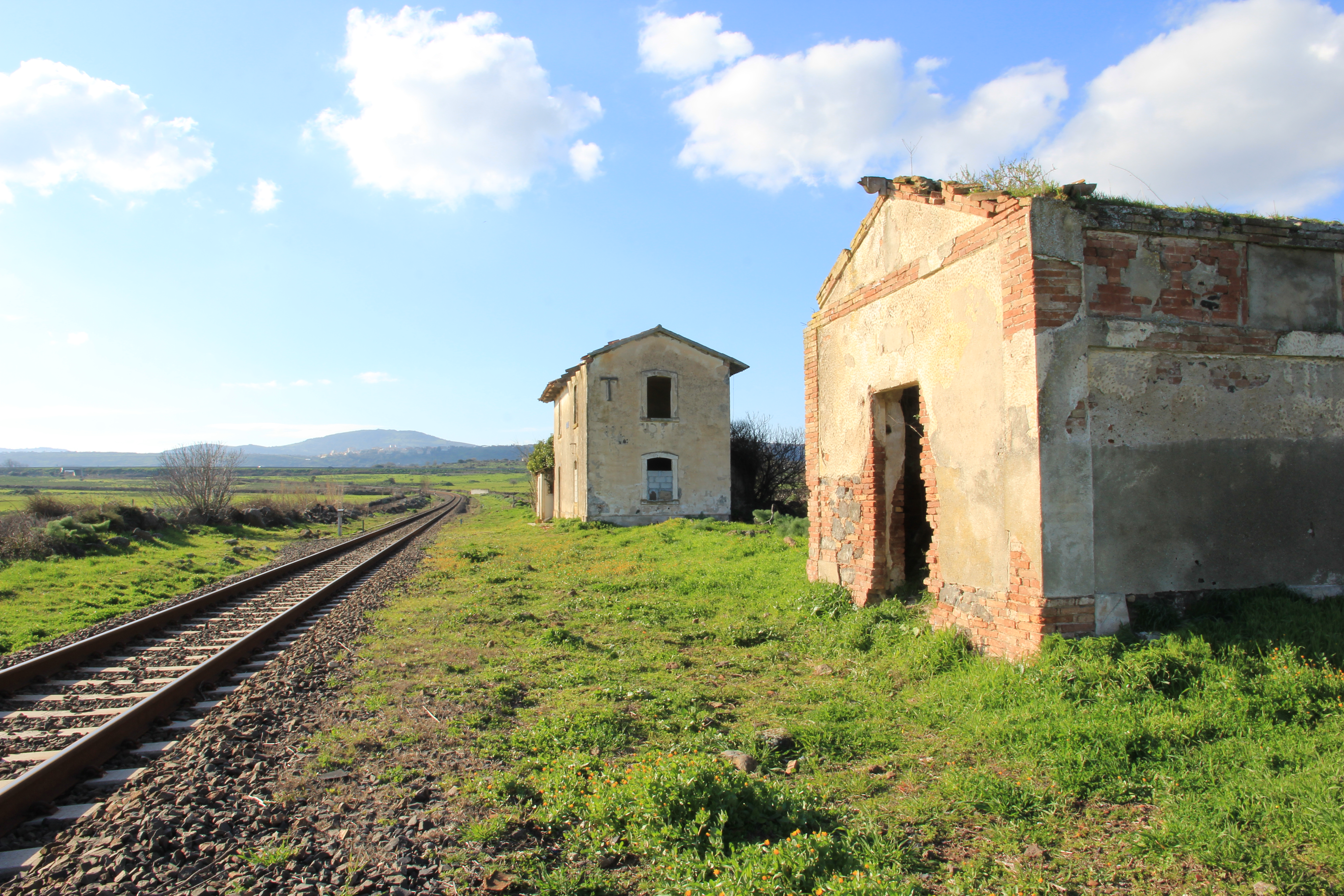 Ex stazione ferroviaria FS di Birori